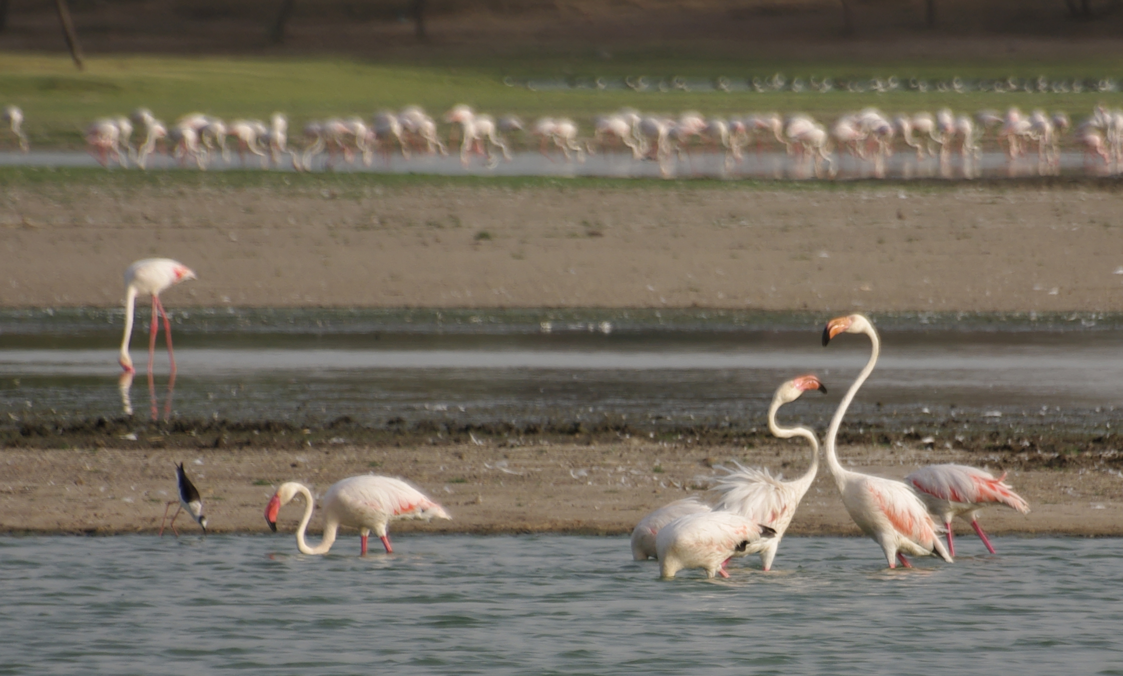 Thol Lake - Gujarat, India